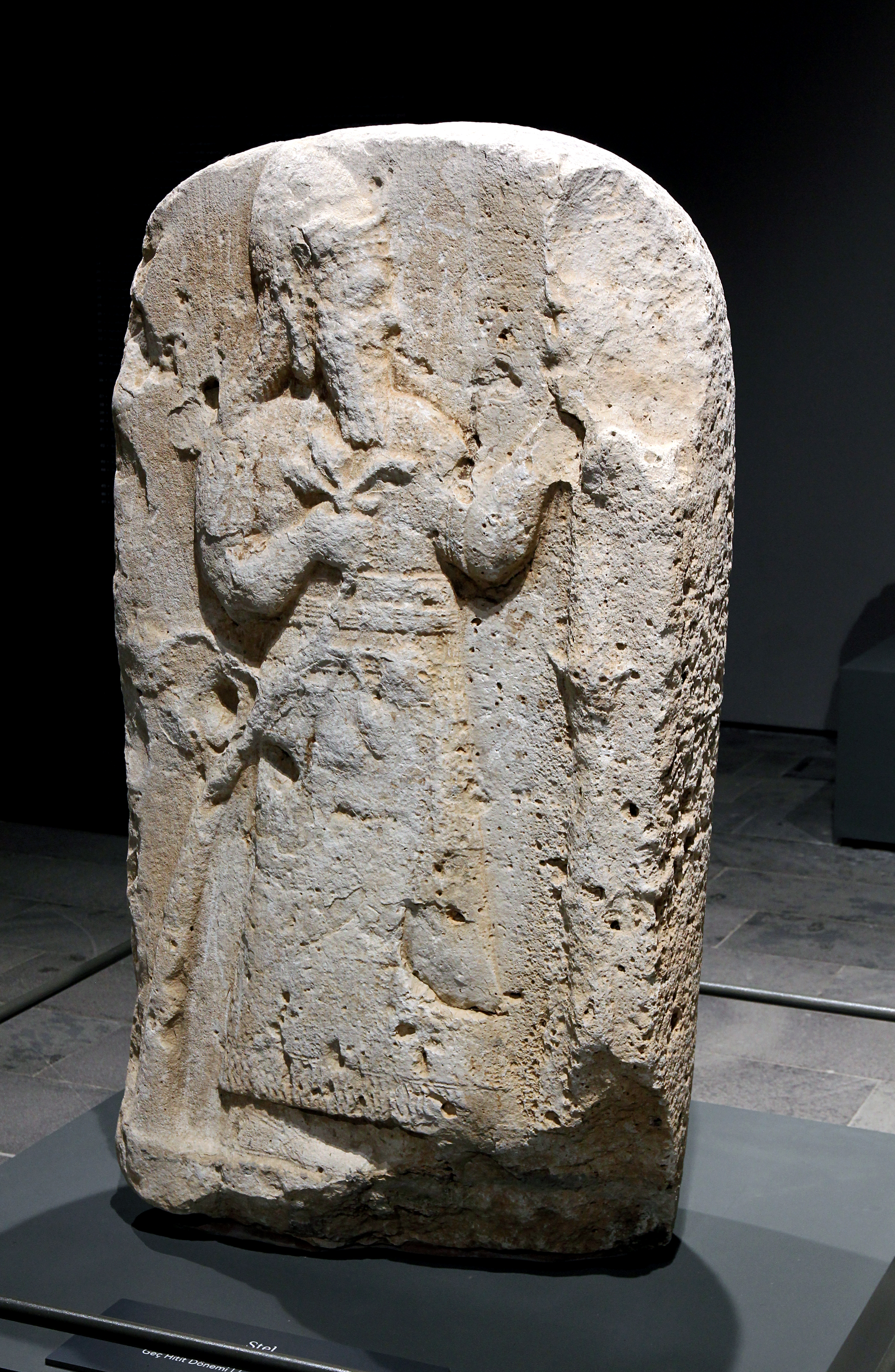 Archäologisches Museum Adana, Südtürkei, späthethitische Stele des Atika aus Karkemiš